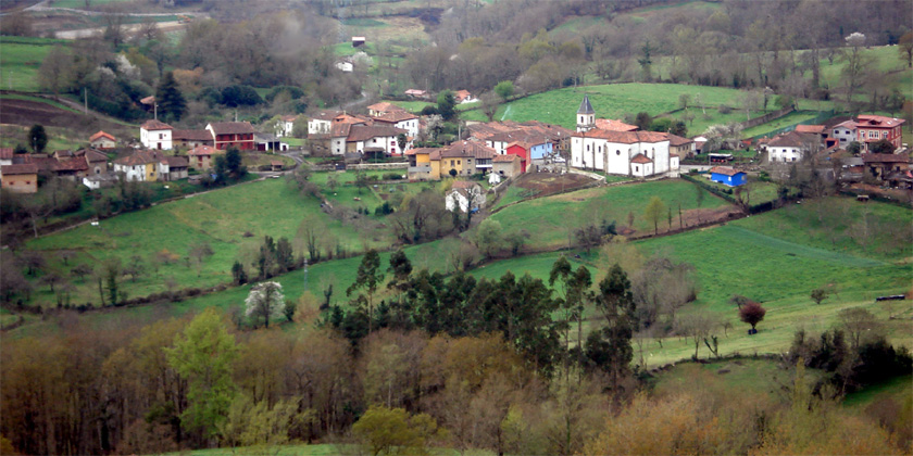 El pueblo de Miyares, concejo de Piloña(Asturias)